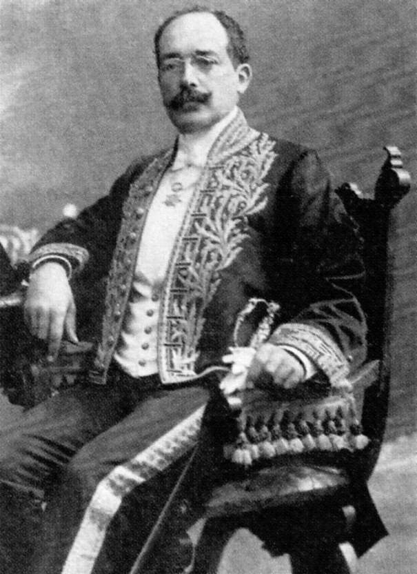 Hernán Velarde Diez Canseco (1863-1935) diplomático y escritor peruano. Ministro plenipotenciario en Brasil, donde logró concertar el Tratado de Límites Velarde-Río Branco (1909). Fue también Ministro de Gobierno (1906-1907).